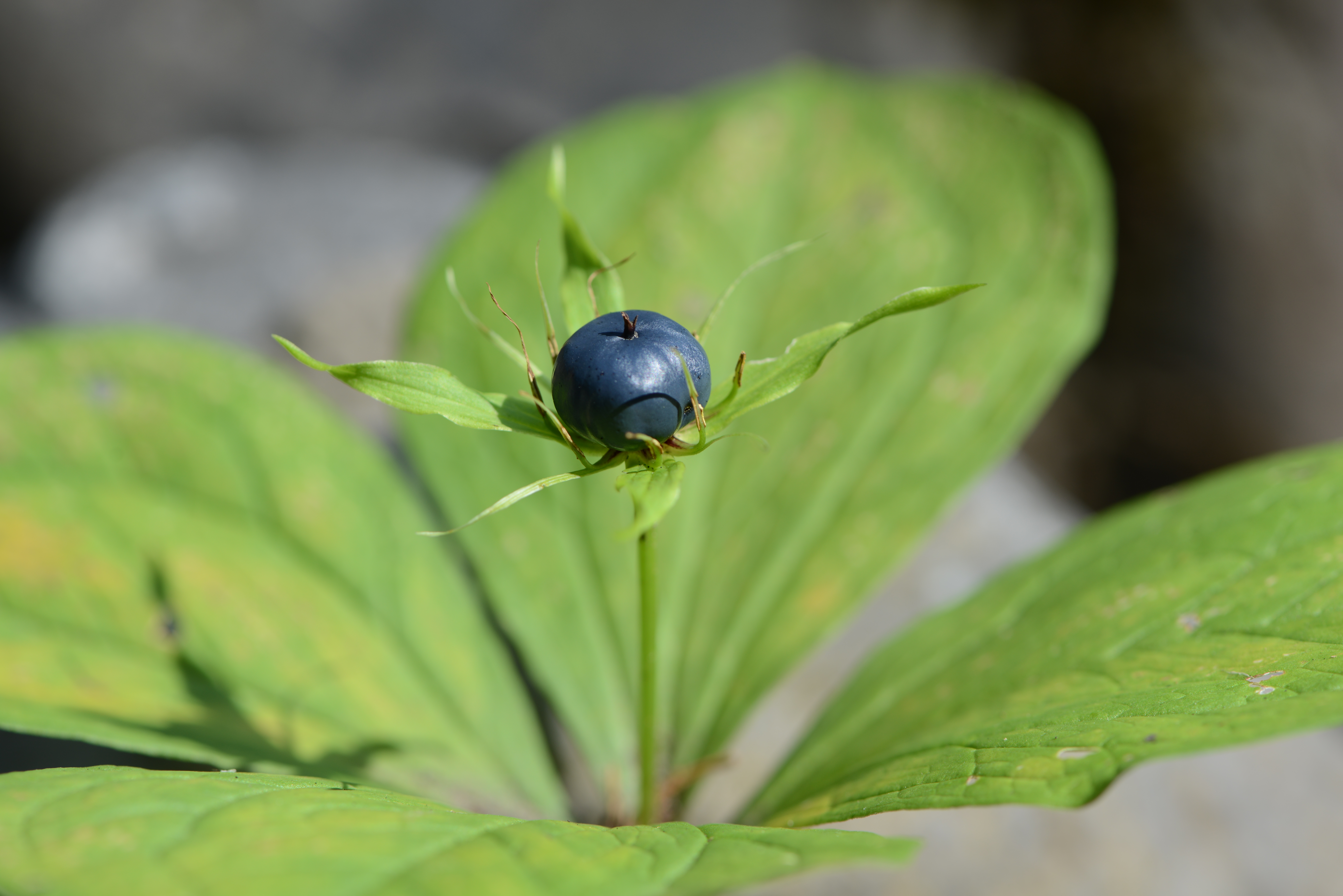 Paris quadrifolia